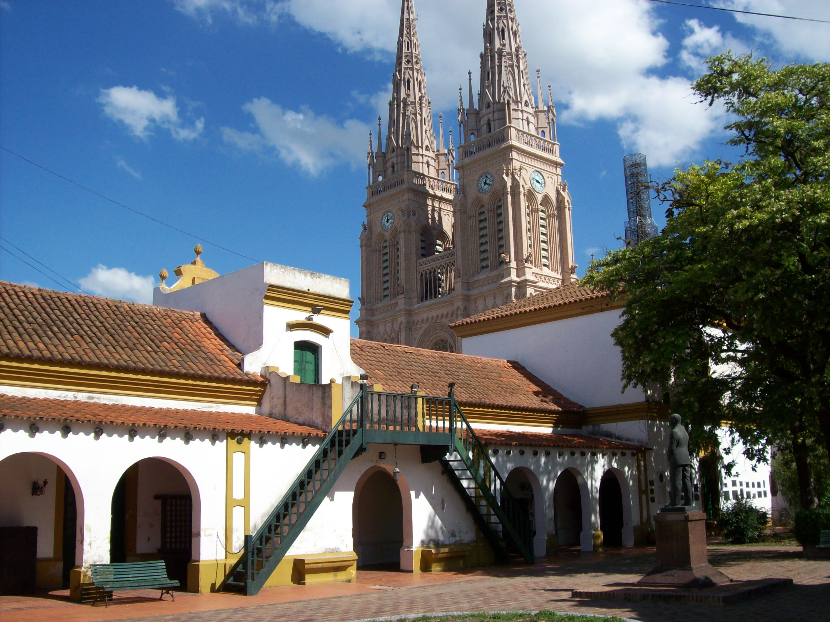 Uno de los patios del museo colonial e histórico Enrique Udaondo, ubicado en Luján, provincia de Buenos Aires, Argentina.